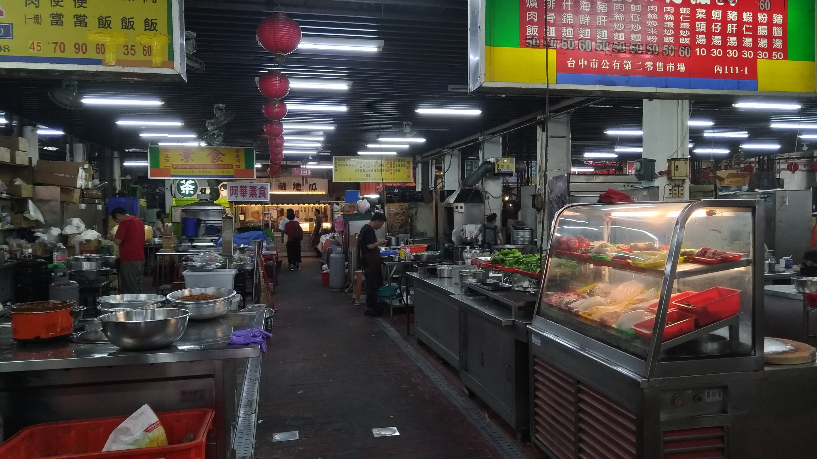 臺中市公有第二零售市場，攝於2019年。